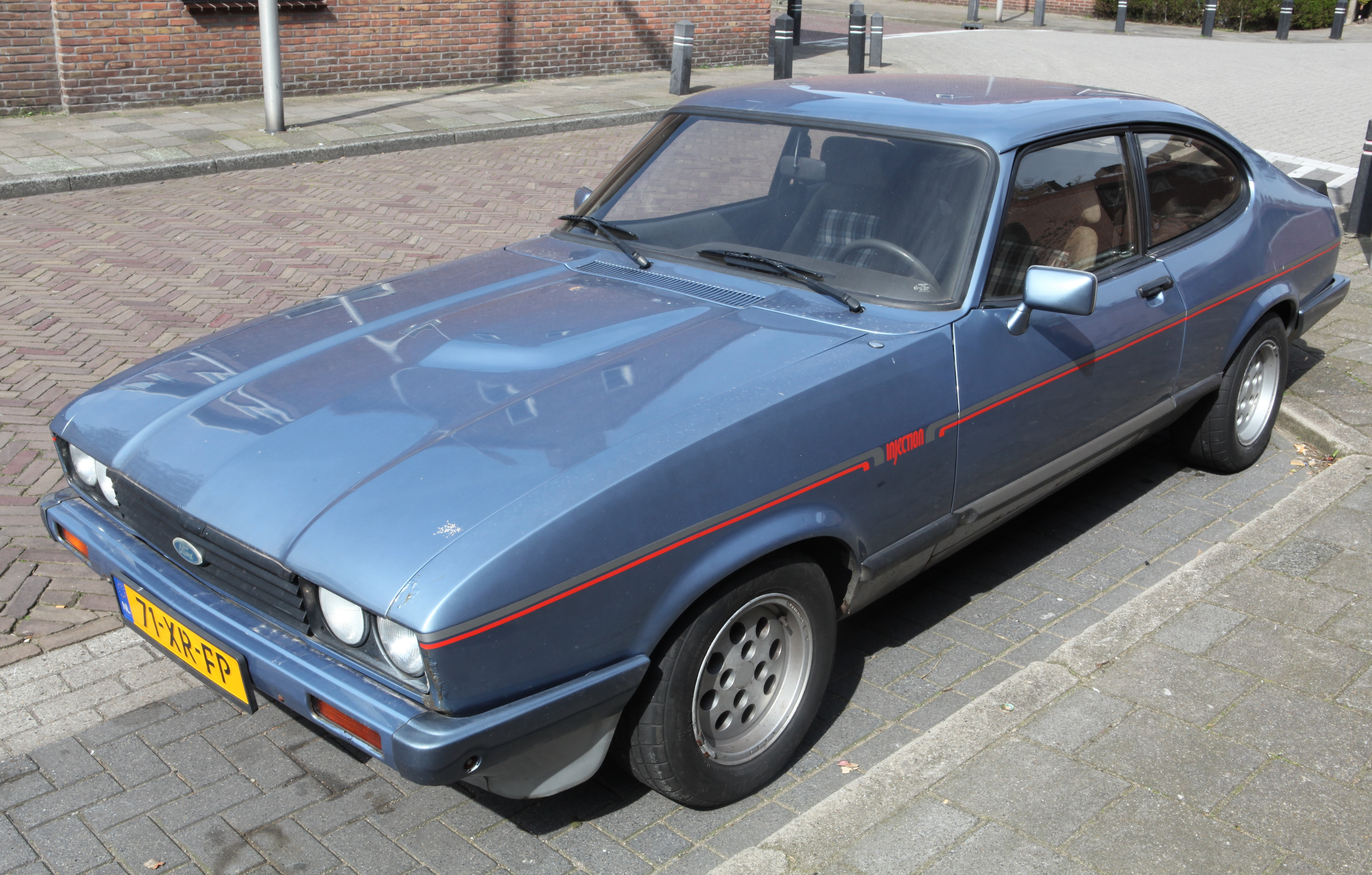 Ford Carpri 2.8 FI Supersport